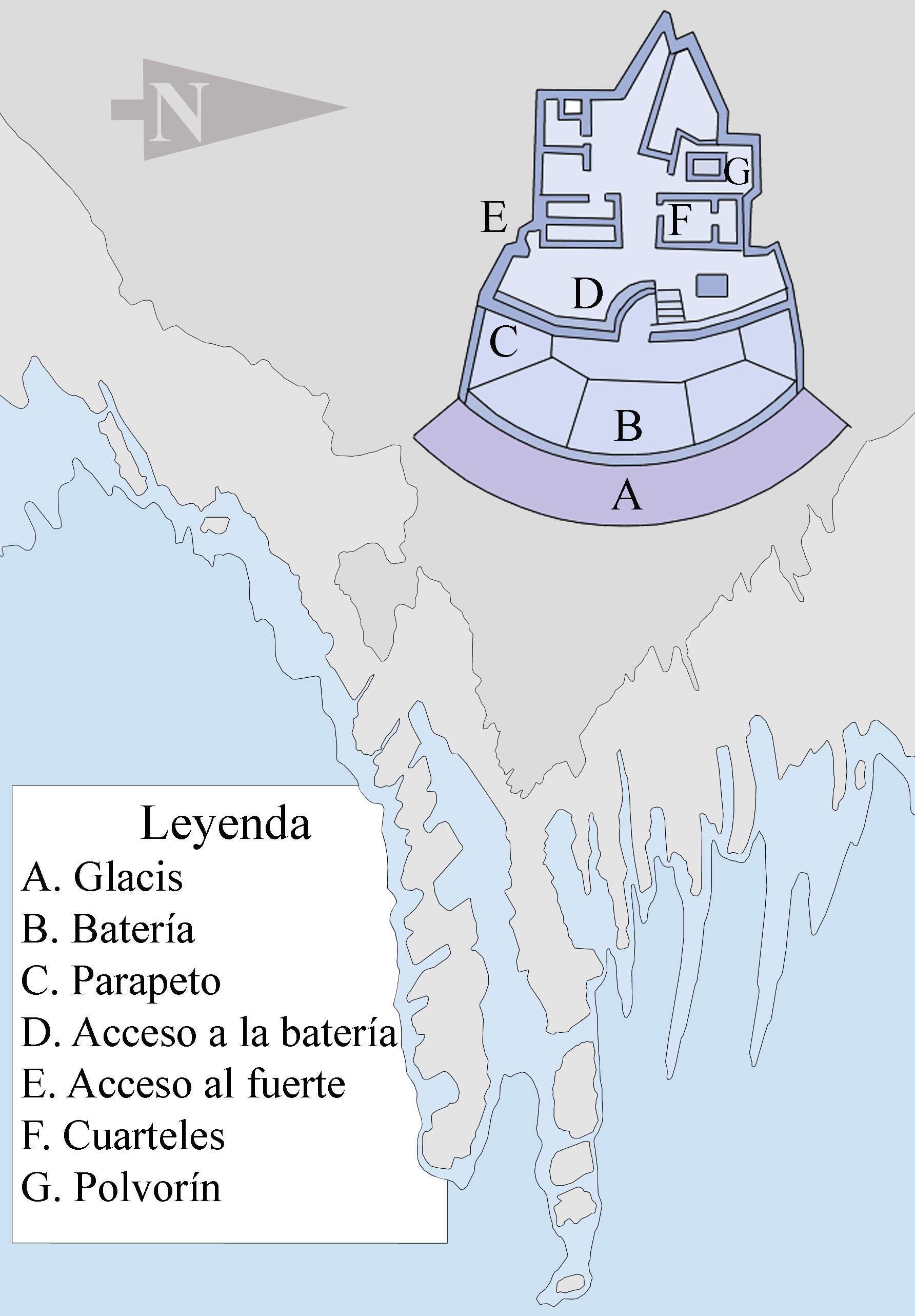 Plano del fuerte de San Diego en Algeciras